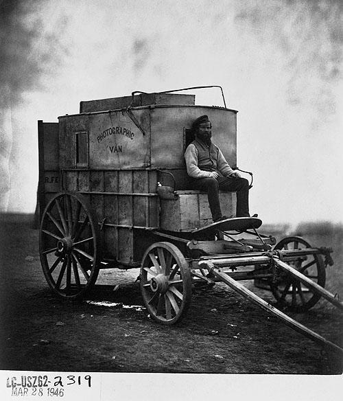 Asystent Rogera Fentona Marcus Sparling na wozie będącym ich laboratorium fotograficznym..